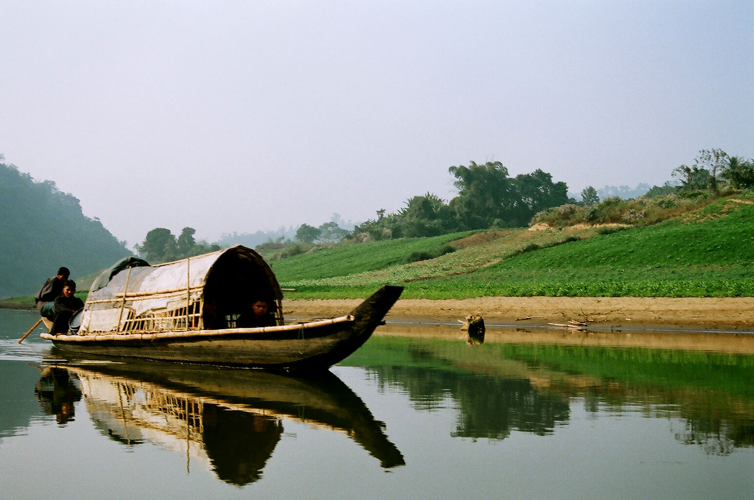 River Sangu in Bandarban, Bangladesh